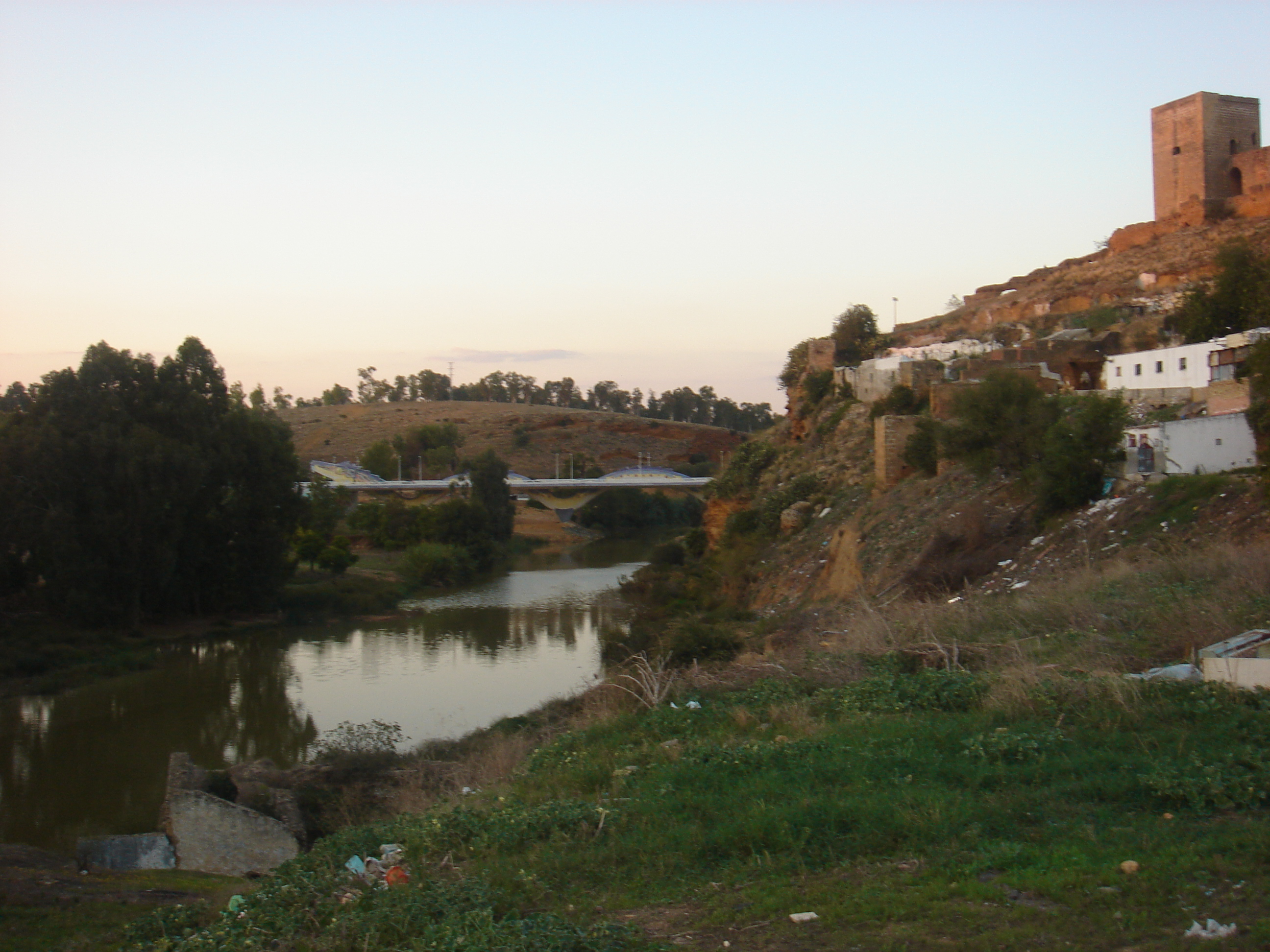 Río Guadaíra a su paso por el Puente del Dragón (al fondo), en la localidad de Alcalá de Guadaíra